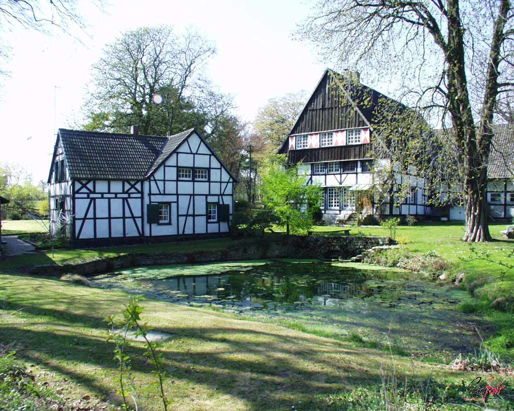 Emscherquelle in Holzwickede